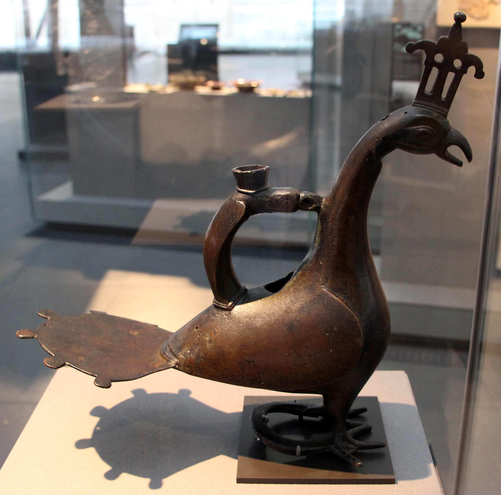 Spagna, acquamanile a forma di pavone reale, 972, lega di rame,.JPG